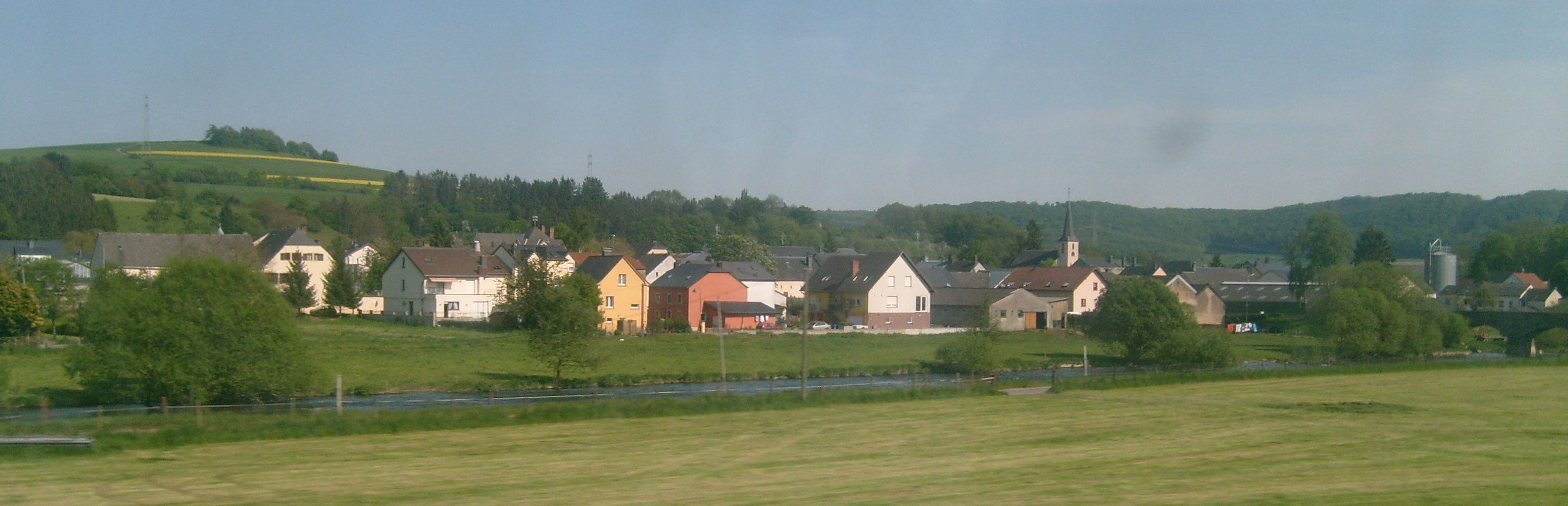 Ierpeldeng aus dem Zug fotograféiert